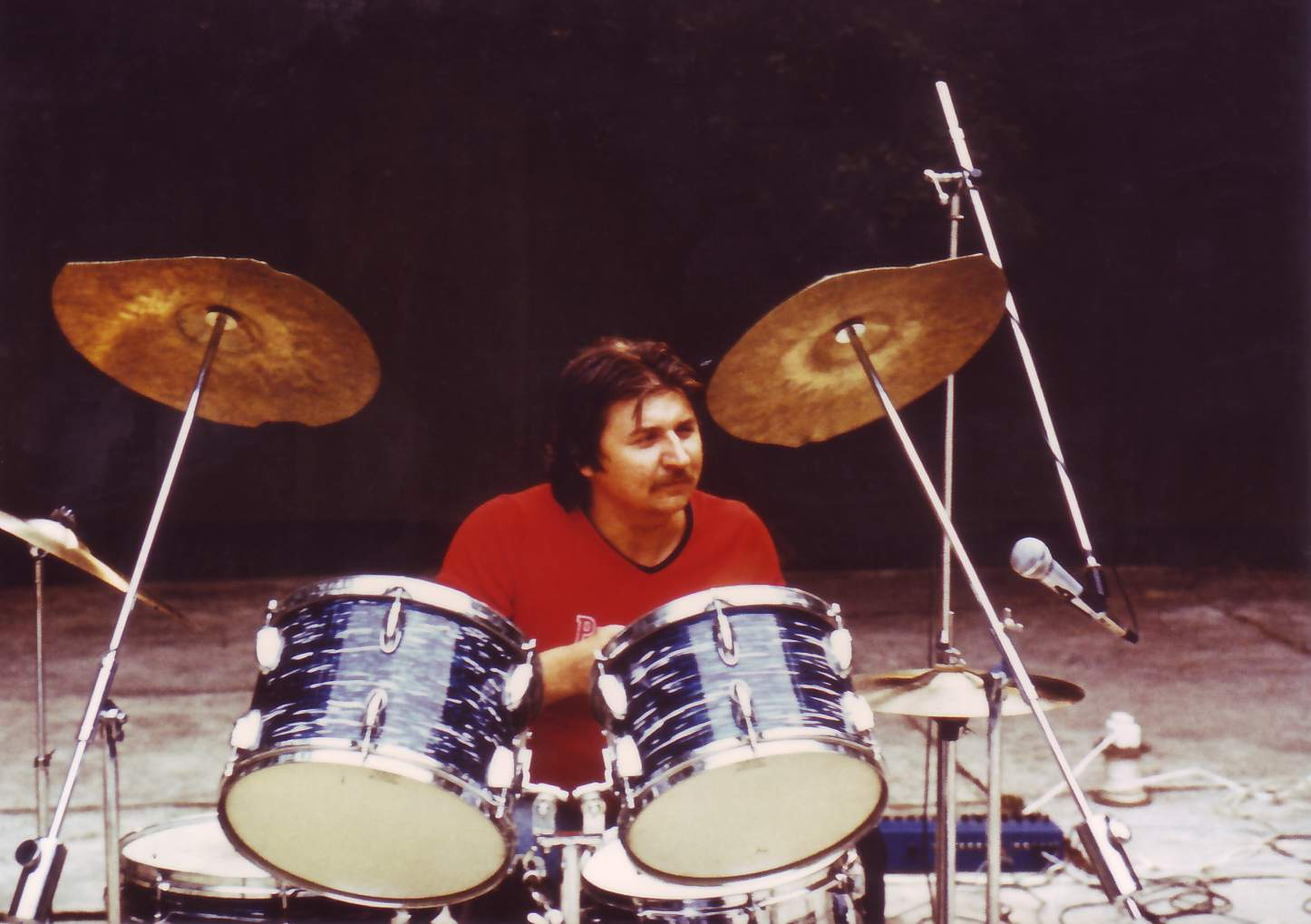 A zenekar tagjairól készült felvétel